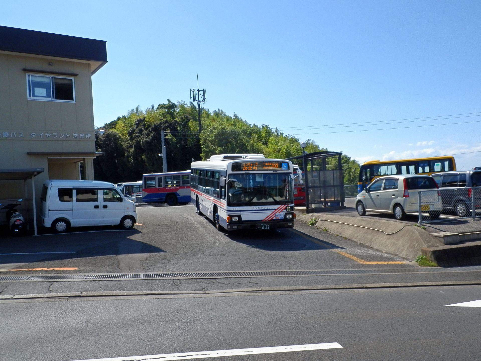 長崎バスダイヤランド営業所始発バス停